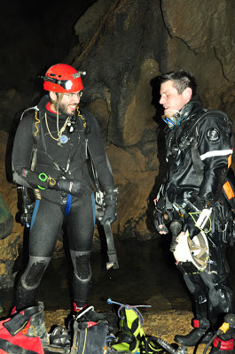 Lezate (Aulesti), 2013ko martxoaren 25a. Laurent Richard eta Damien Vignoles urpekariak kobako azken sifoia esploratzen, ADES Espeleologia Elkarteko kideen laguntzaz.